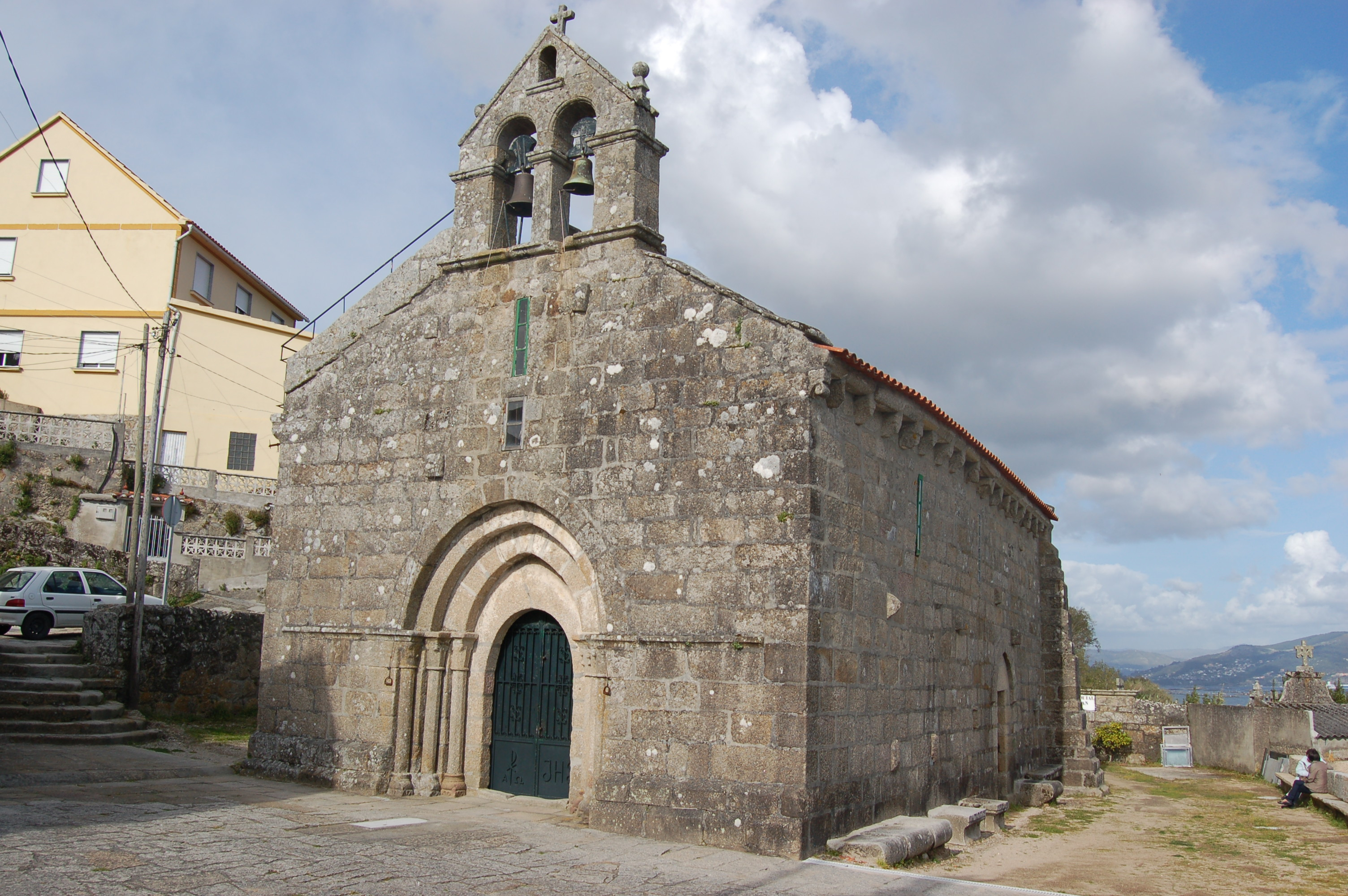 Igreax parroquial de San Xoán de Tirán